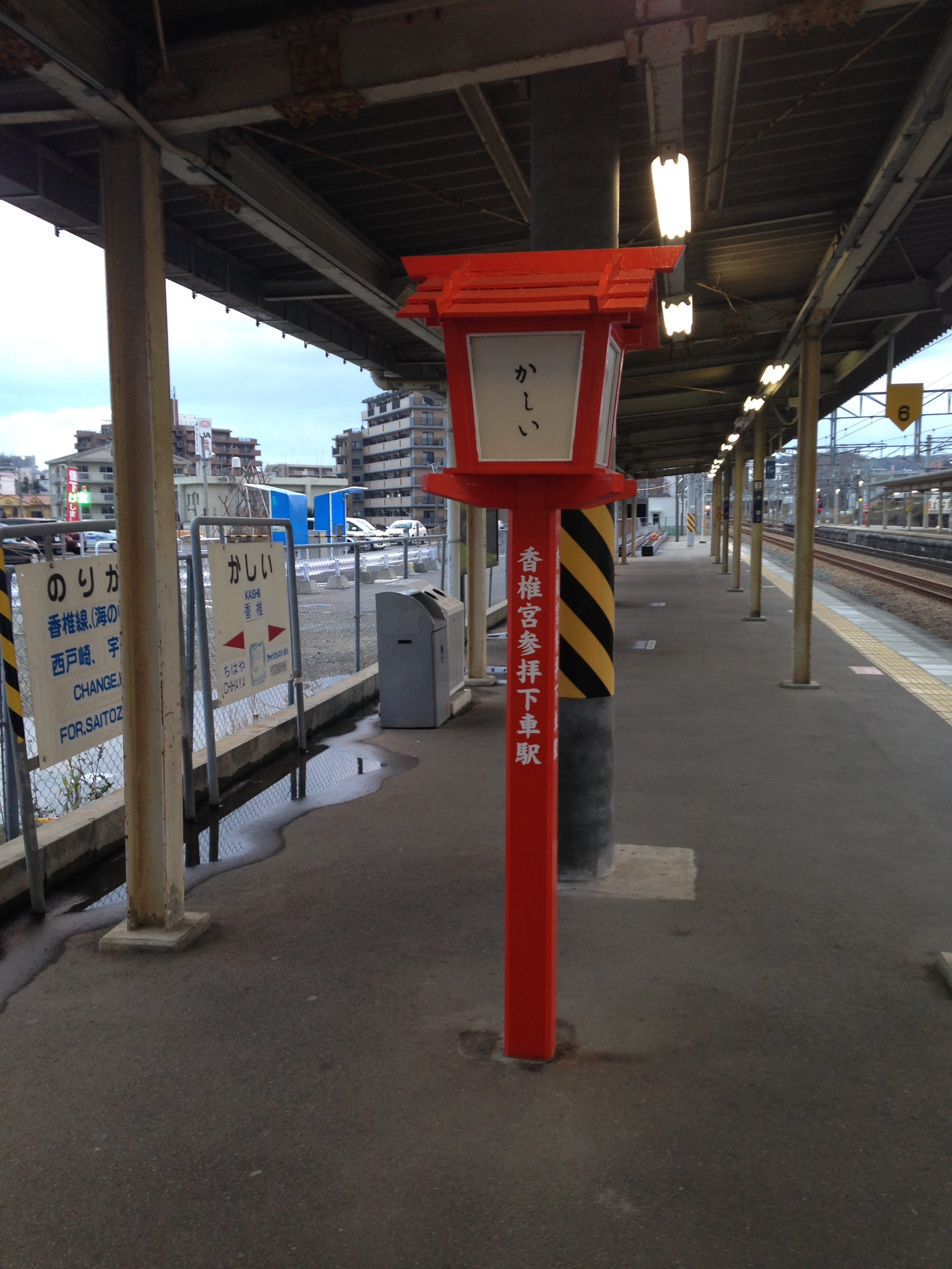 香椎駅ホーム